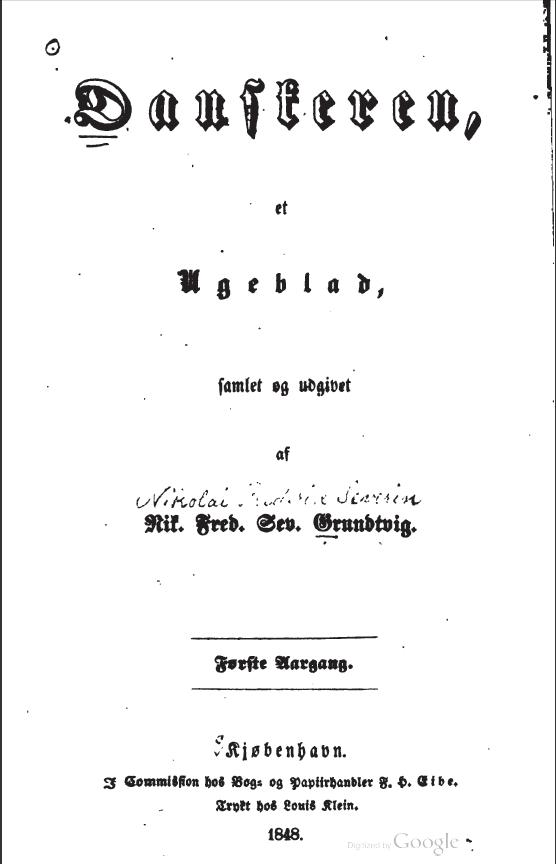 Danskeren et ugeblad, Volum 1 av N.F.S. Grundtvig. I Commission hos Bog- og Papiirhandler F.H. Eibe, 1848